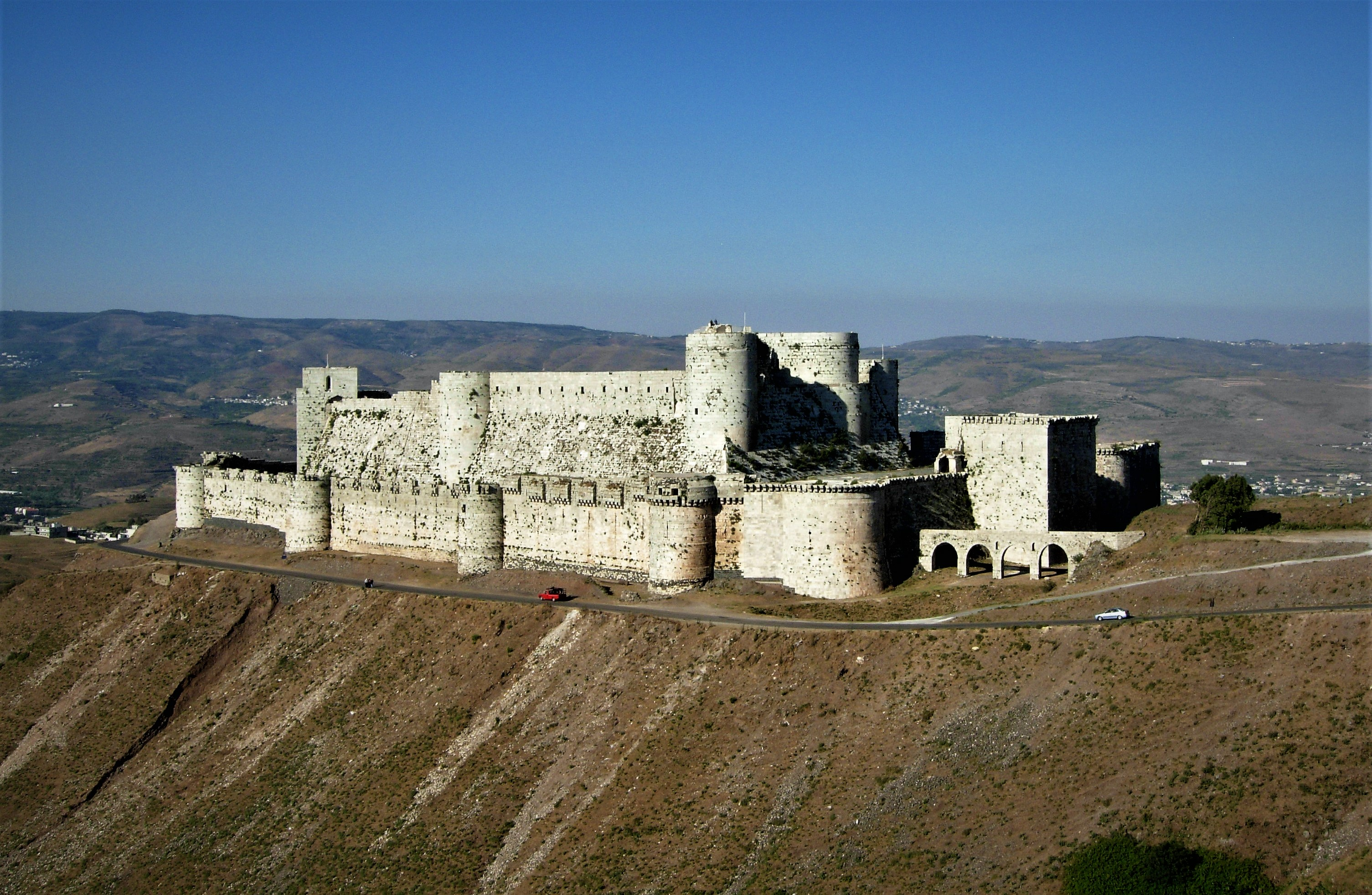 中文（台灣）: 敘利亞騎士堡外觀